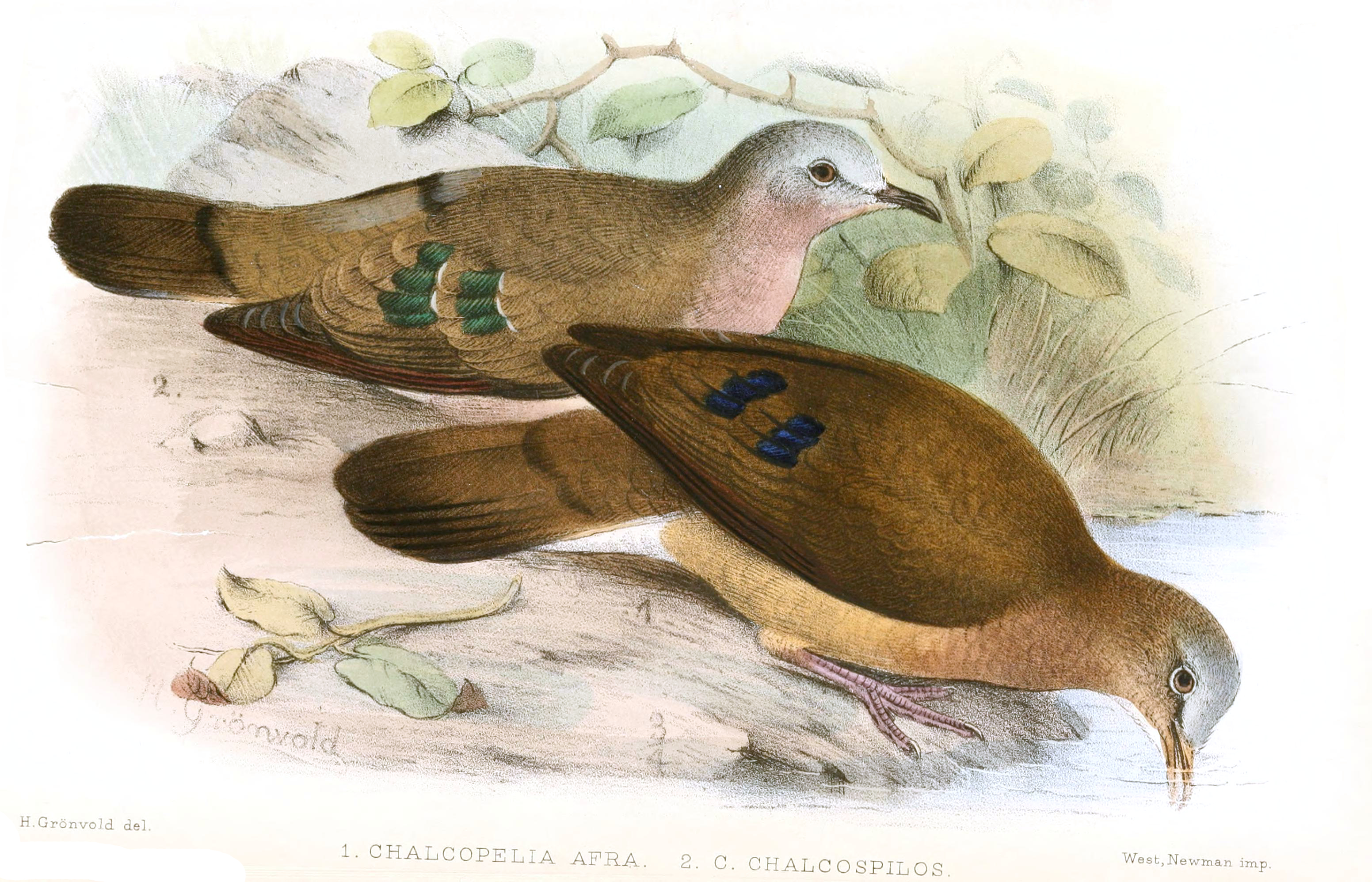 Chalcopelia afra and Chalcopelia chalcospilos